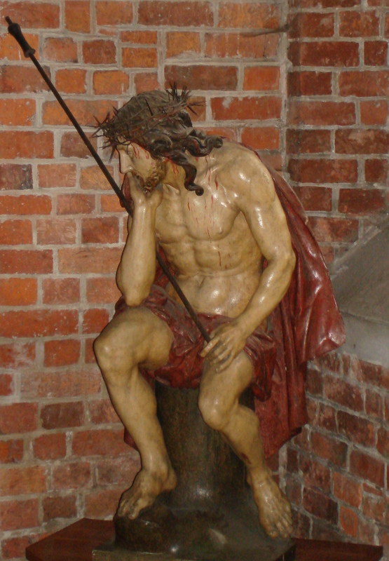 Wrocław, kościół pw. św. Wojciecha, figura Chrystusa Frasobliwego